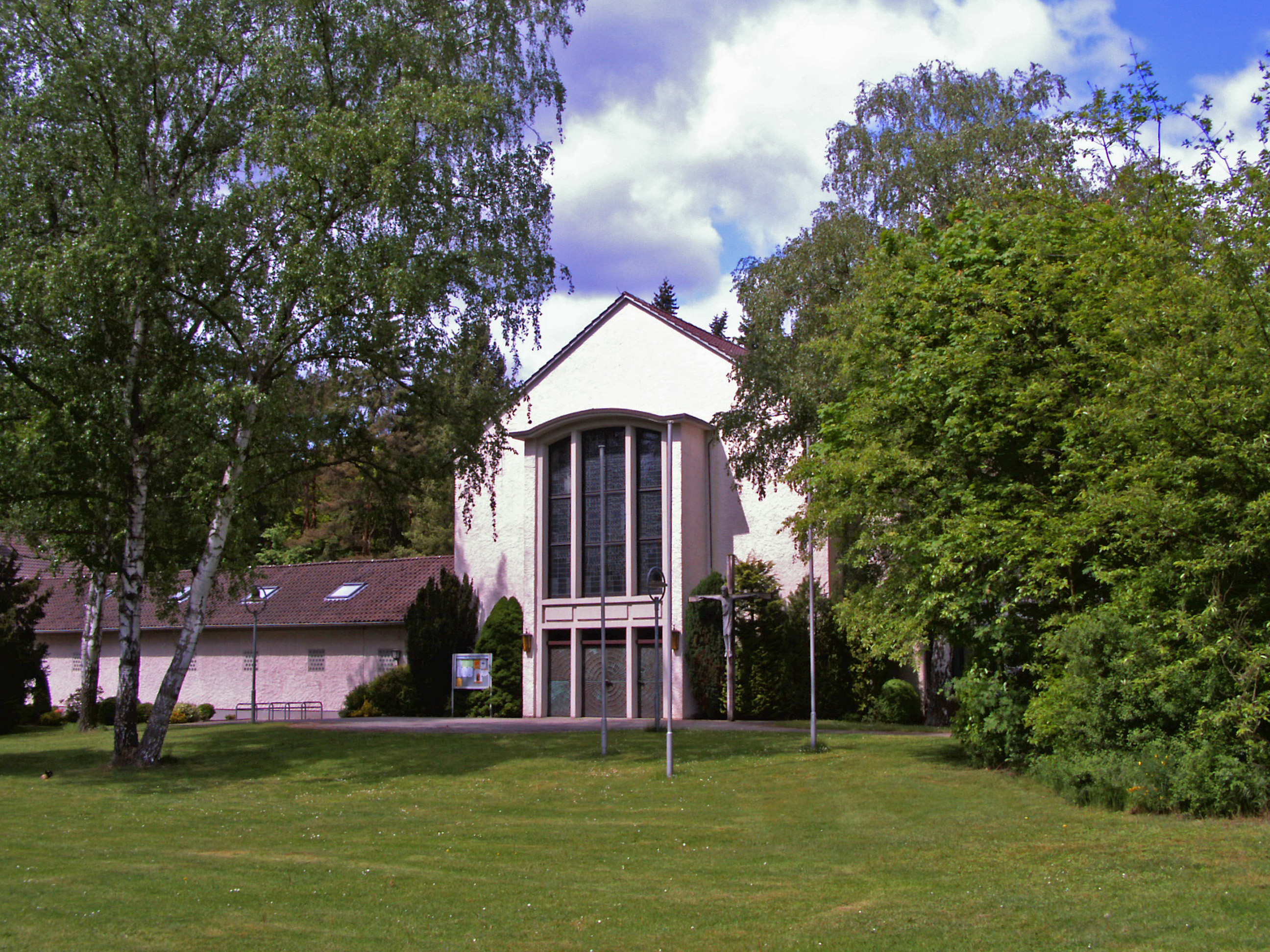 Katholische Kirche St. Hedwig in Celle (Marienwerderallee 10)